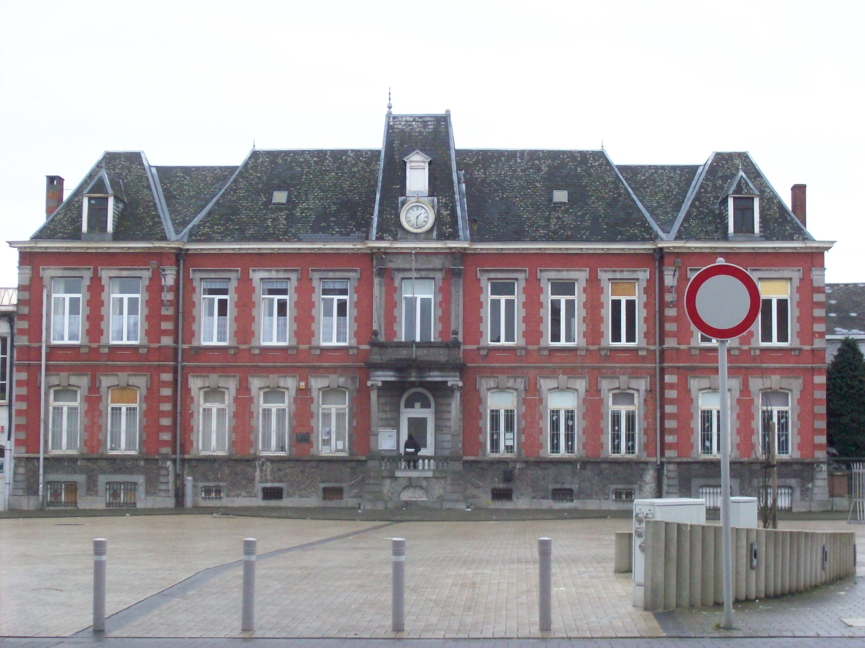 commune de Haine-Saint-Pierre (Belgique-Hainaut)